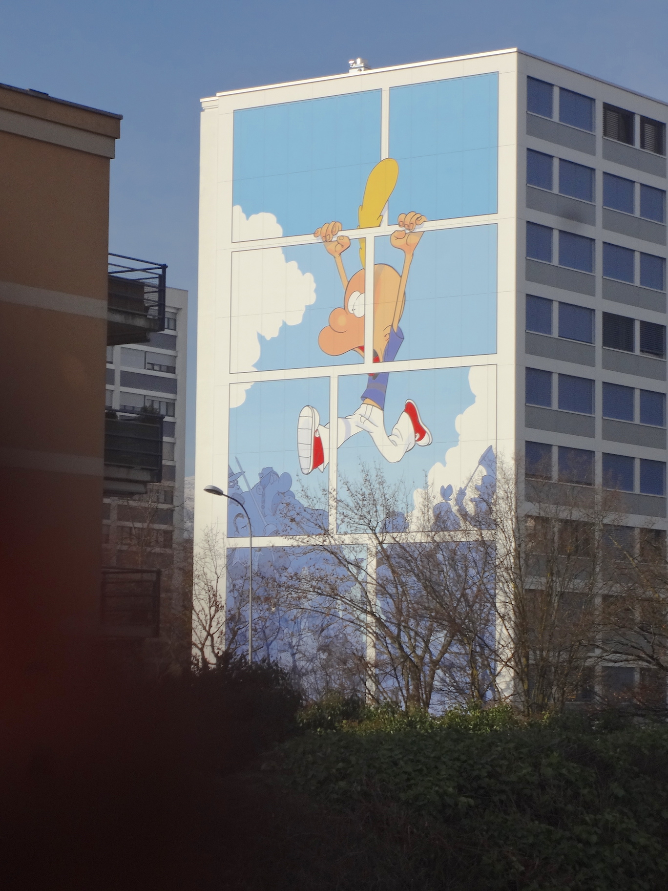 Le personnage de Titeuf est peint sur la façade rénovée d'un immeuble à la rue de la Calle, Onex, canton de Genève.